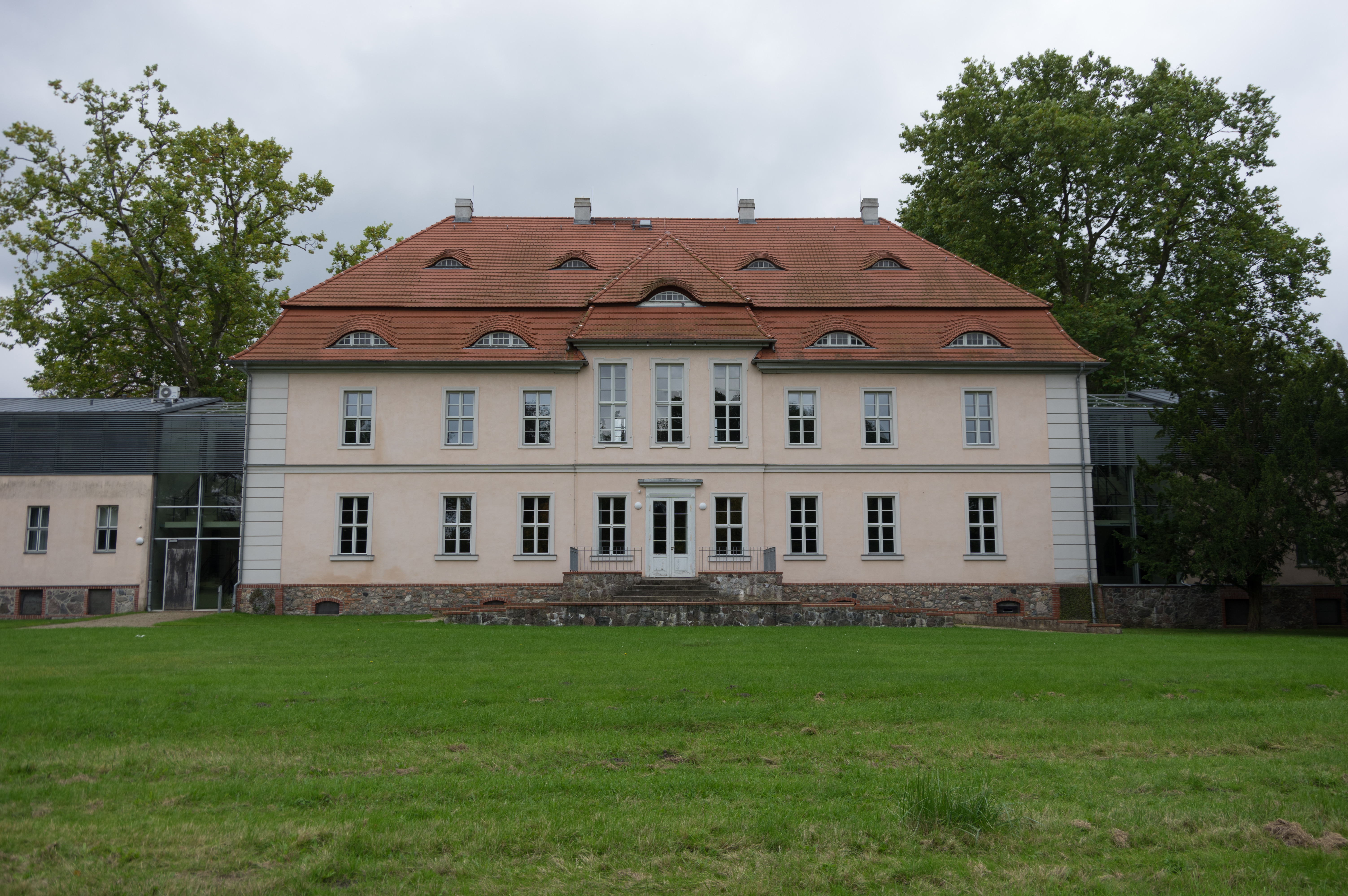 Schwedt/Oder, Ortsteil Criewen in Brandenburg. Das Schloss oder Herrenhaus Criewen wurde in der heutigen Form ab 1818 erbaut.